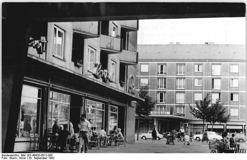 Zentralbild-Sturm Sch-At. 20.9.1962 Dresden: Neues Leben blüht aus den Ruinen ! Dresden - das ist eine Stadt, die berühmt war wegen ihrer kostbaren historischen Bauten, ihrer wertvollen Kunstgalerien, wegen ihrer schönen Parks und Gärten, ihrer Hochschulen und Industrie, und der man den treffenden Beinamen "Elbflorenz" gab. Der weitaus größte Teil dieser oftmals unersetzlichen Kostbarkeiten sank innerhalb weniger Stunden durch anglo-amerikanische Angriffe, bei denen nach vorsichtigen Schätzungen 40 000 Menschen umkamen, in Schutt und Asche. Aber die Menschen gaben nicht auf. Sie begannen, ein neues Dresden zu bauen. Neue Häuser wurden gebaut, historische Bauwerke erstanden wieder in alter Schönheit, und auch die Industrie entwickelte sich neu. UBz: Ein neu entstandenes Geschäftszentrum Dresdens."